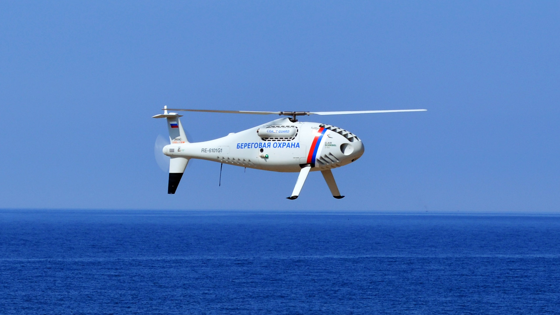 Посадка БПЛА Camcopter S-100